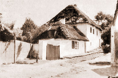 Brüderhof der Täufer in Bergen